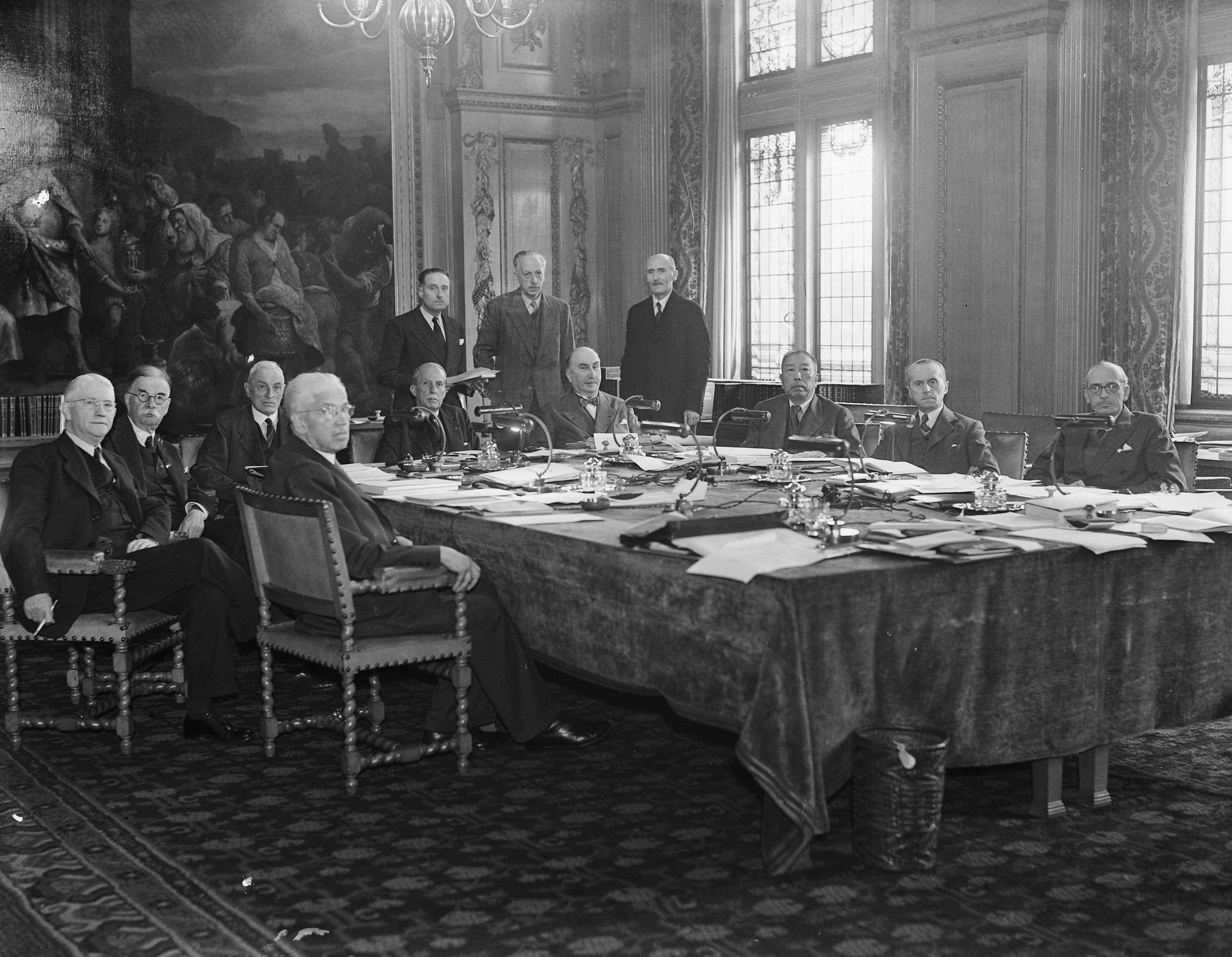 Collectie / Archief : Fotocollectie Anefo Reportage / Serie : [ onbekend ] Beschrijving : Het Permanente Hof van Internationale Justitie bijeen. Laatste sessie voor de opheffing onder leiding van president Guerrero. Vlnr. Hudson (USA), Jhr W. van Eysinga (Holland) Sir Cecil Hurst (Engeland), Erich (Finland), Guerrero (El Salvador, president), Negulesco (Roemenie, ), Cheng (China), De Visscher ( Belgie), Olivan (Spanje) leden van het Internationaal Hof voor Justitie. Staande de drie secretarissen. Datum : oktober 1945 Locatie : Den Haag Trefwoorden : internationale organisaties, rechtbanken, rechters Fotograaf : Meijer, […] / Anefo Auteursrechthebbende : Nationaal Archief Materiaalsoort : Glasnegatief Nummer archiefinventaris : bekijk toegang 2.24.01.09 Bestanddeelnummer : 900-9770